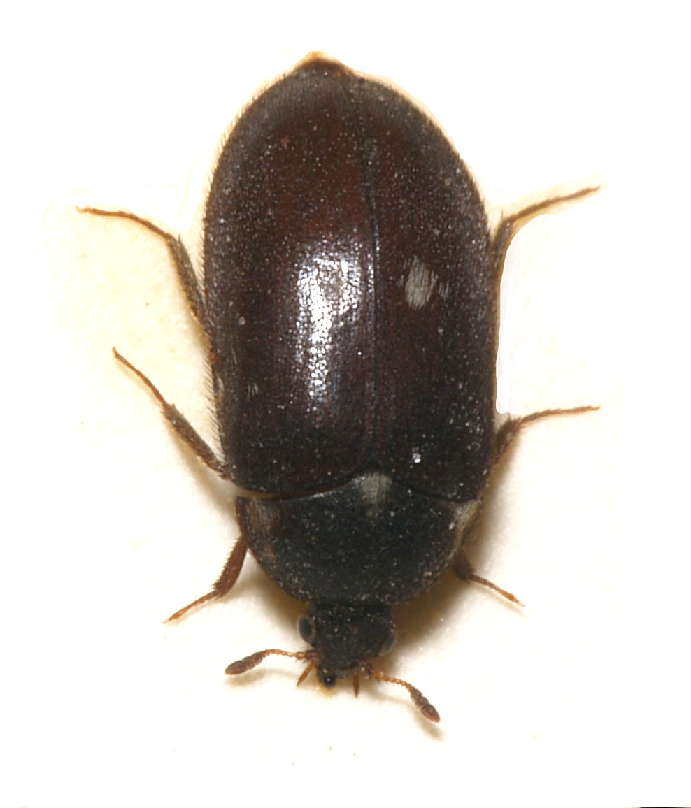 Attagenus pellio